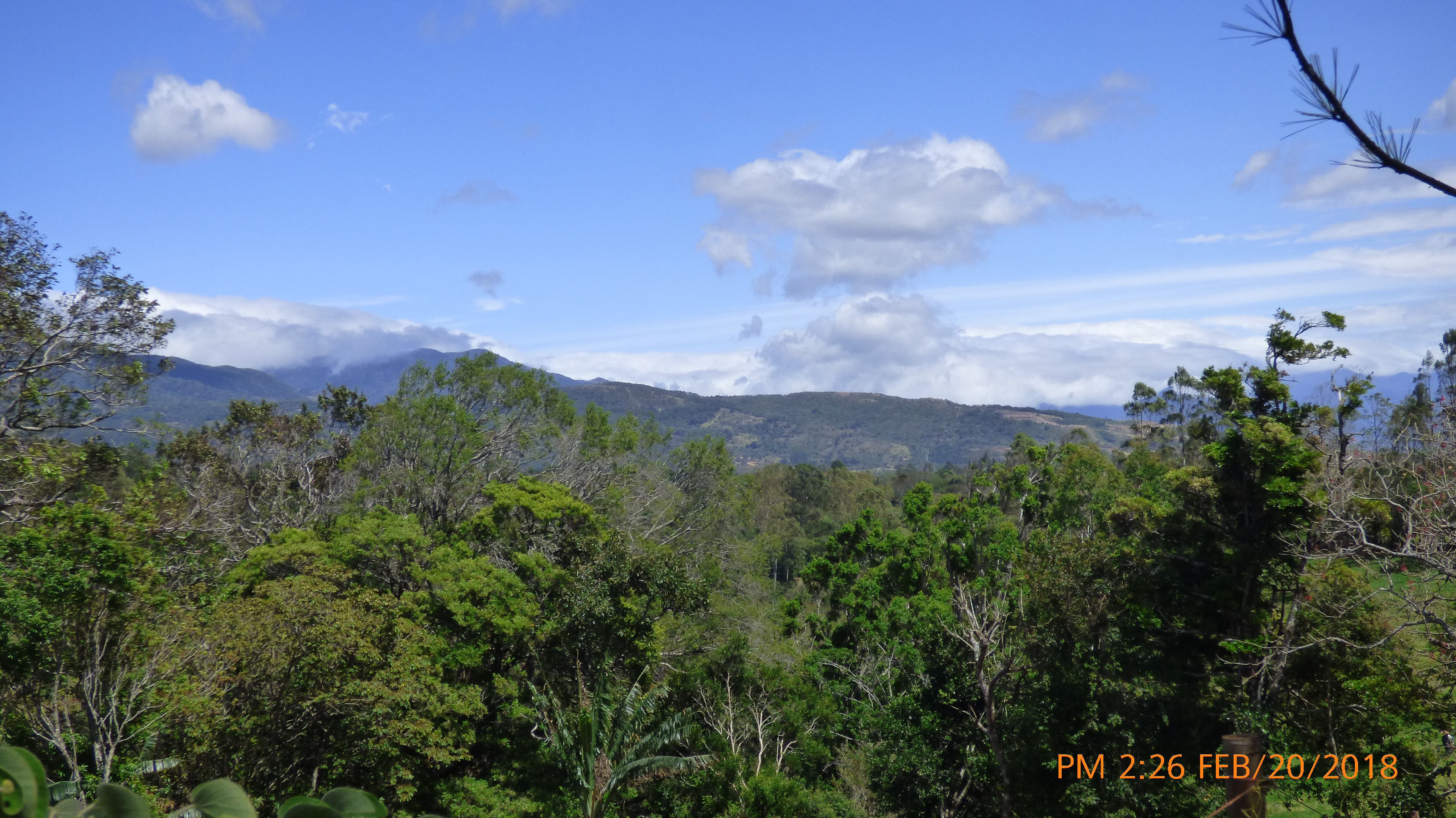 Vista panoranica desde Palmira hacia Alto Boquete por encima de los arboles. Al fondo Jaramillo y el Cerro Orqueta